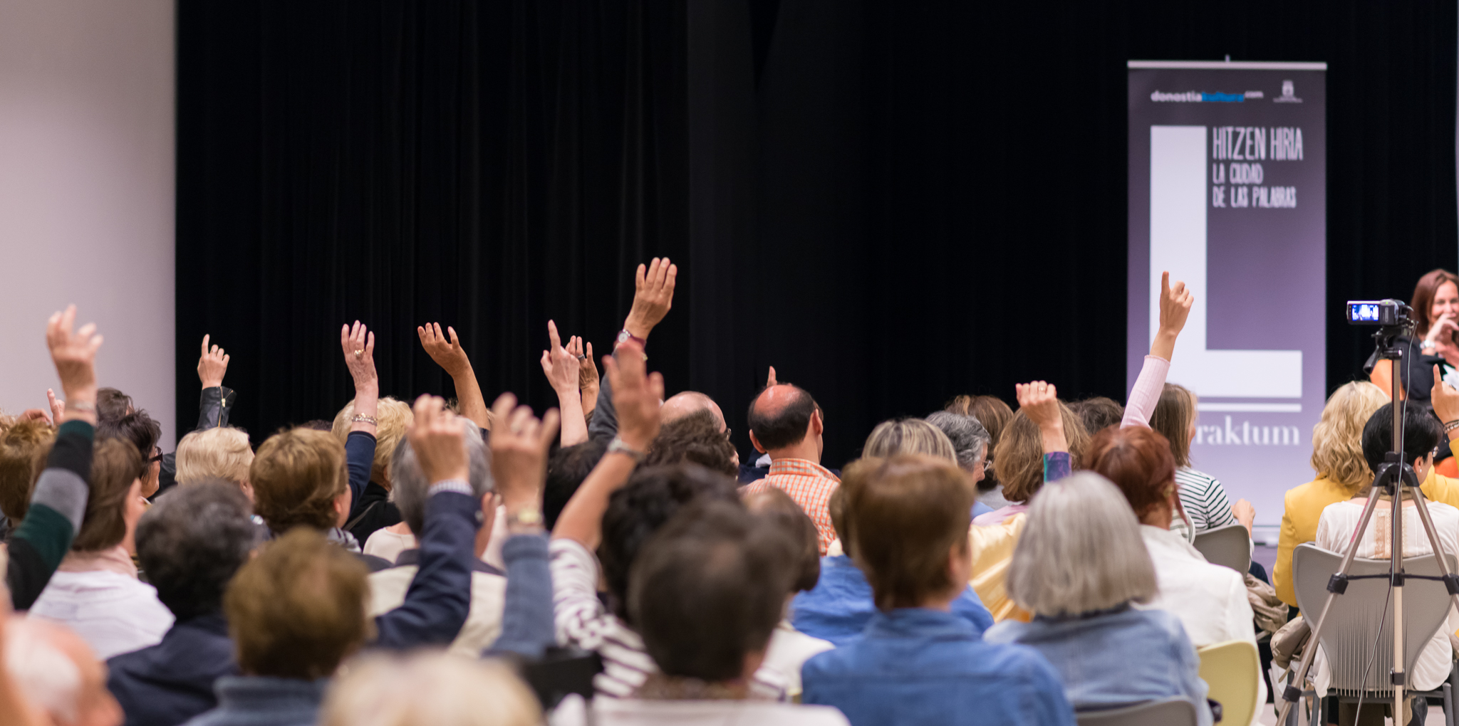 Literaktum 2015 Okendo Kultur Etxean.